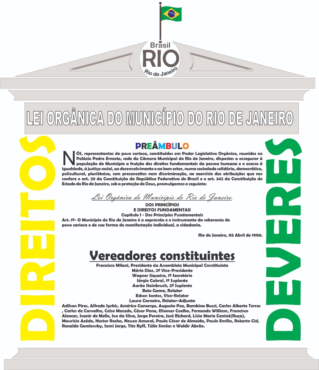 Pórtico com a parte preambular e os constituintes da Lei Orgânica do Município do Rio de Janeiro.